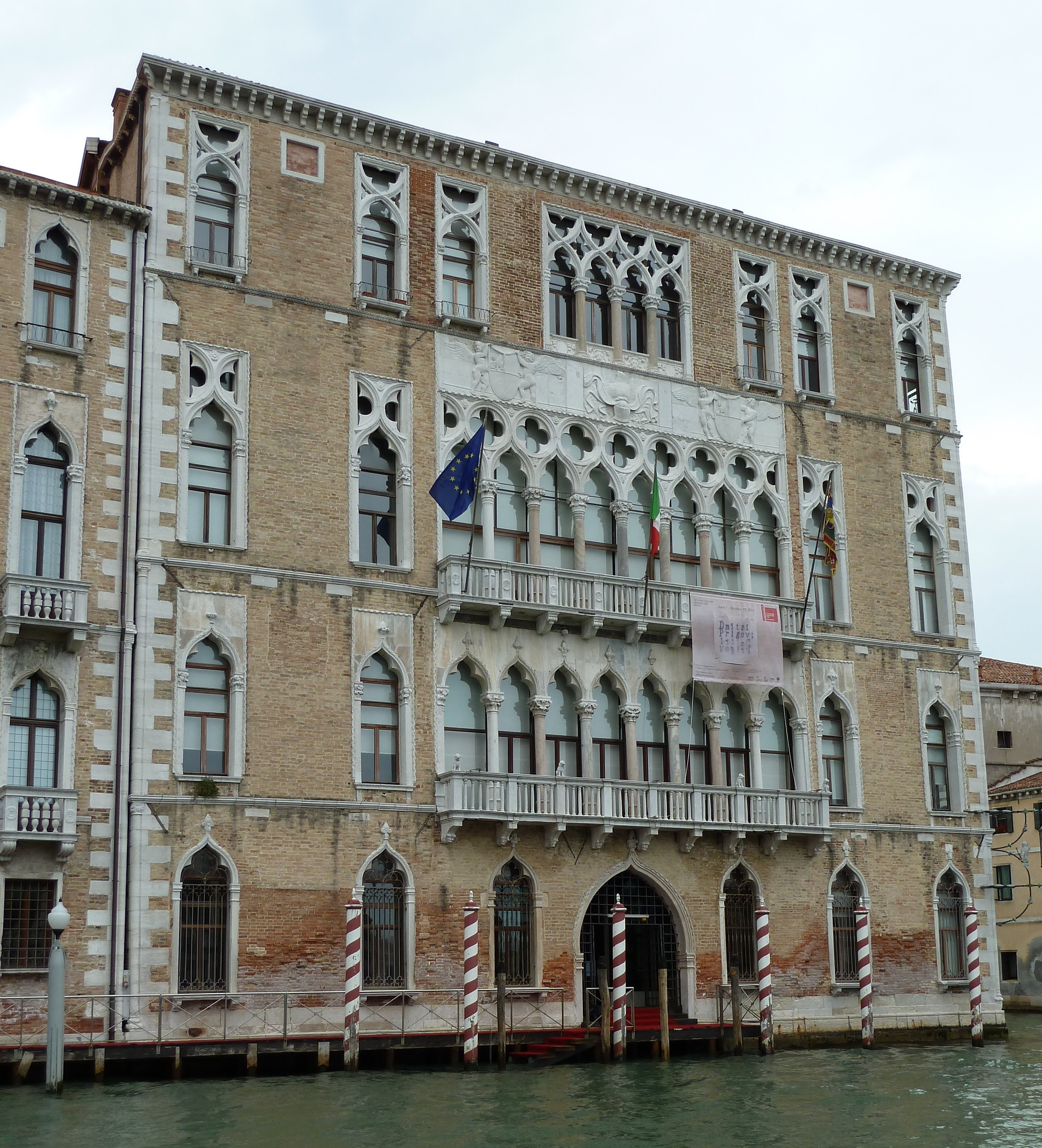 ca'foscari